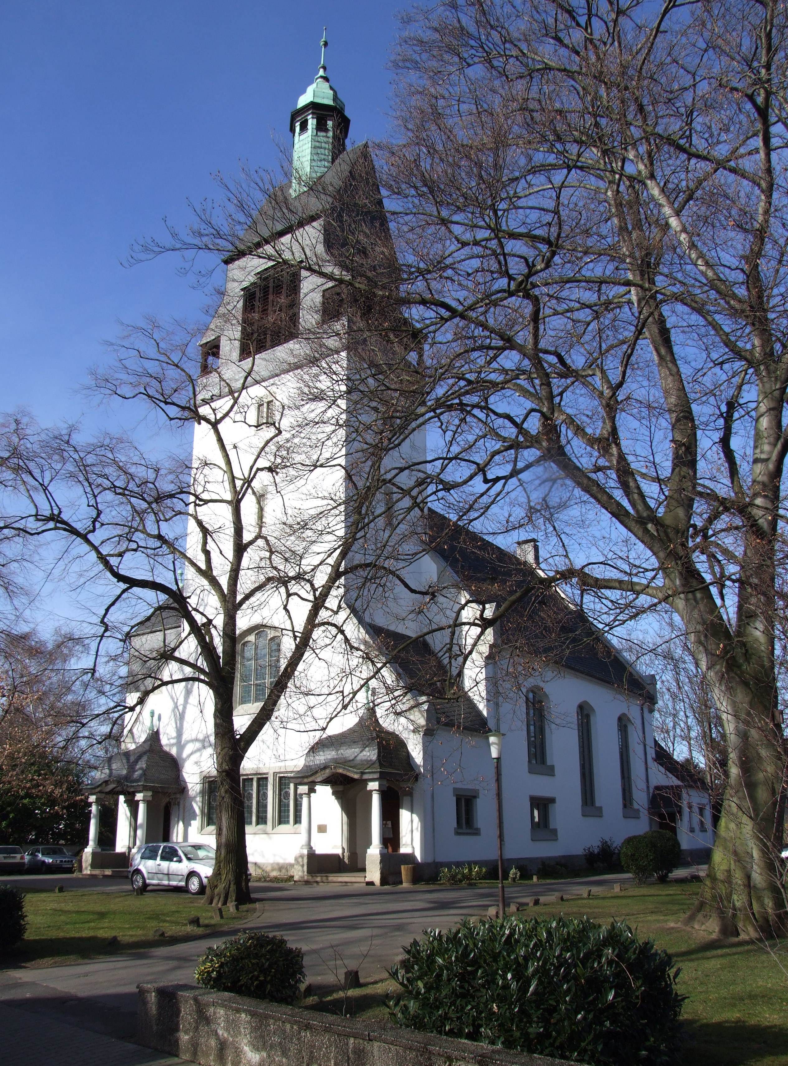 Evangelische Kirche in Oberkassel, erbaut 1908 nach Plänen von Baurat Otto March, die Turmhöhe beträgt 46 Meter